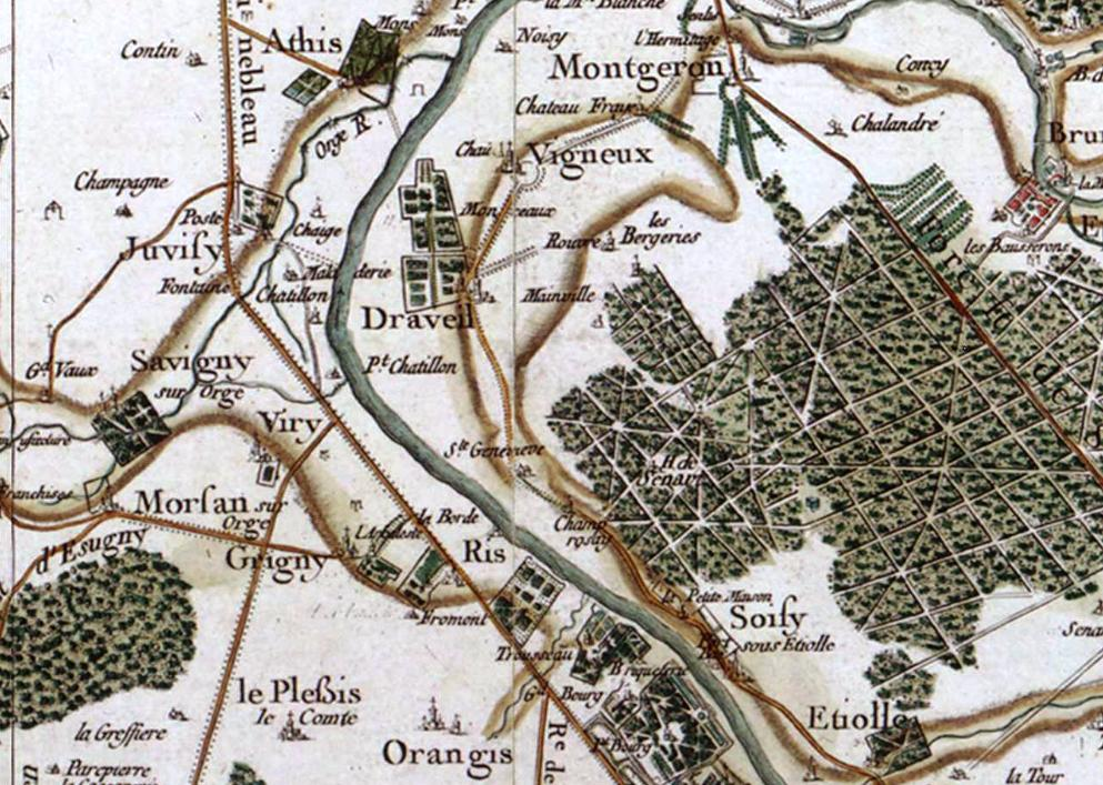 Carte de la région de Draveil (91) au XVIIe siècle par Cassini.